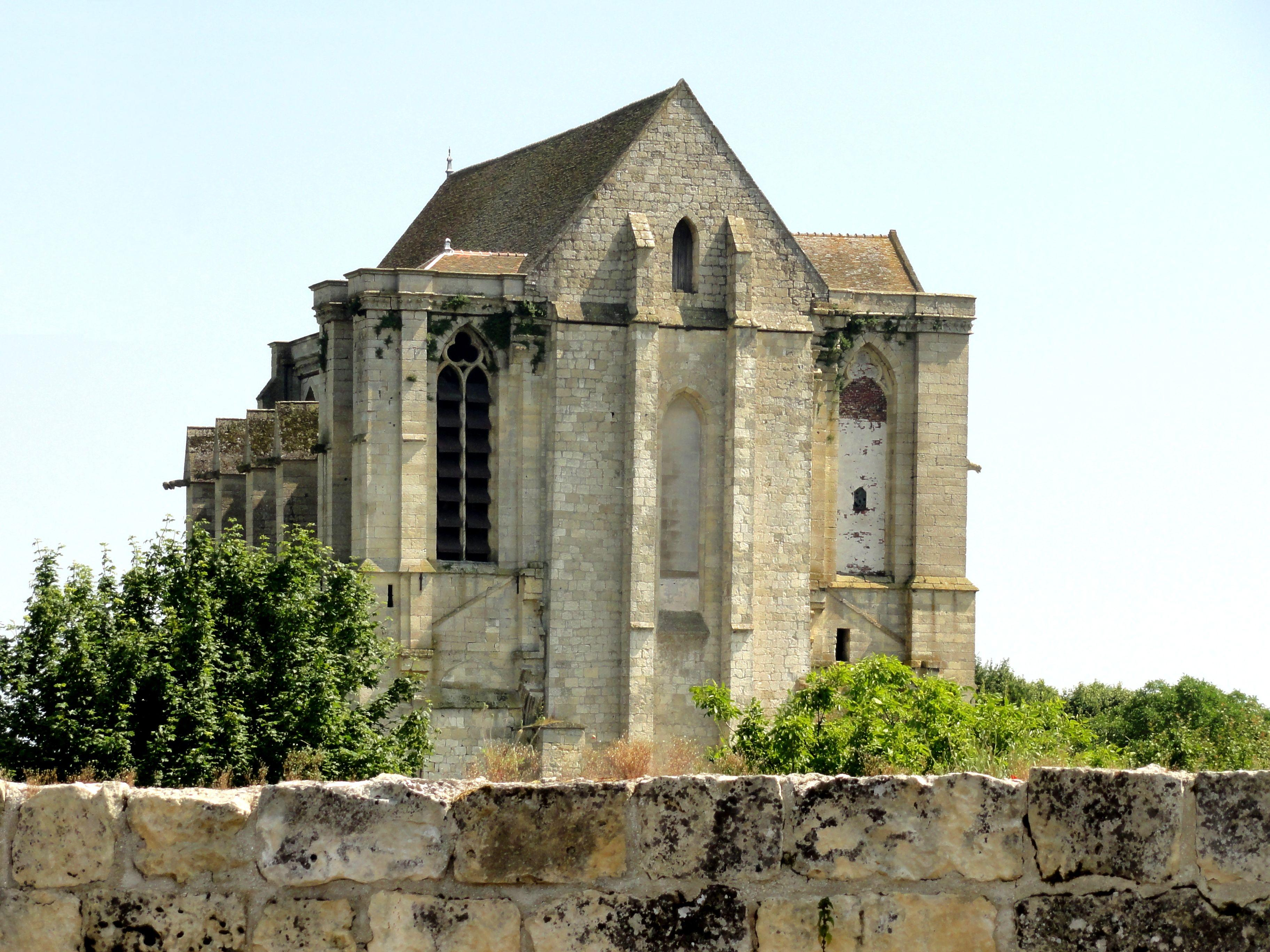 Vue depuis le nord-ouest.